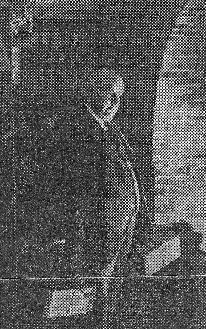 Carl S. Petersen i det Kongelige Biblioteks magasinkælder i 1929